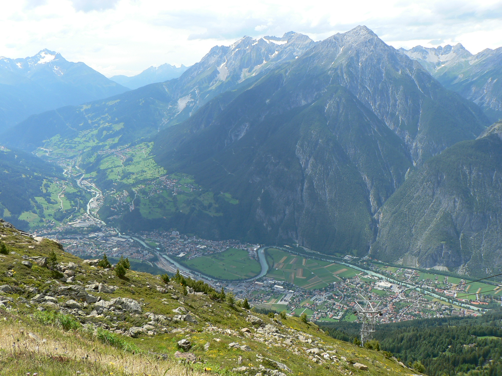 Blick ins Inntal vom Gipfel des Krahberg